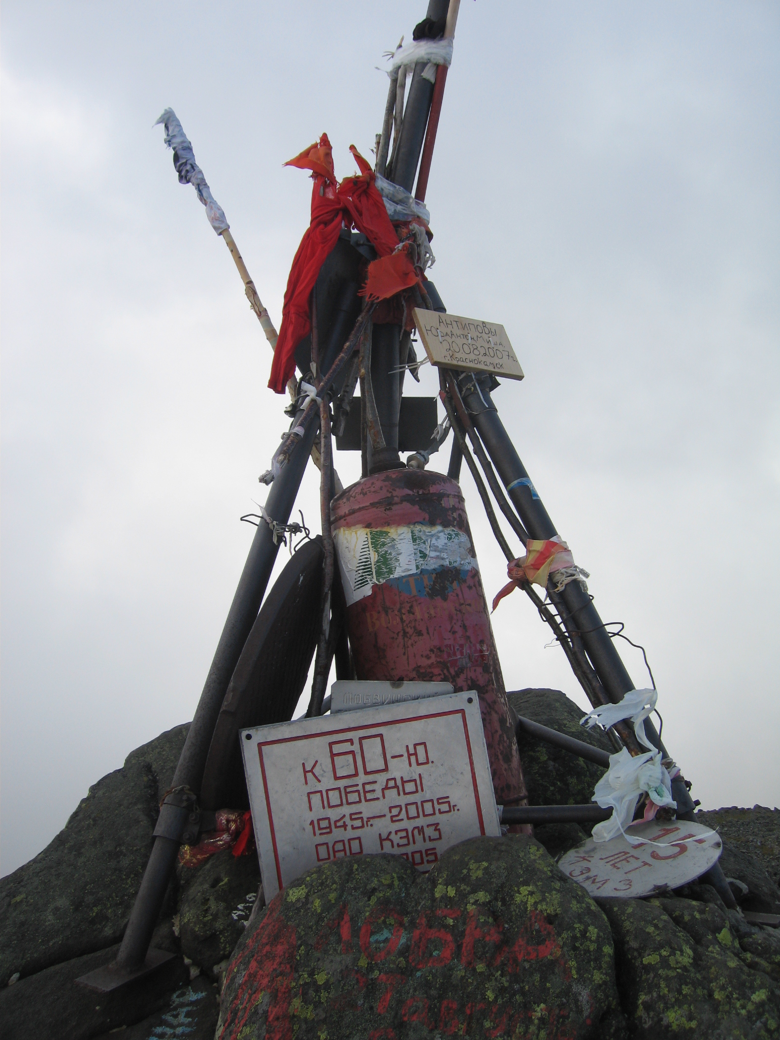 Вершина Конжаковского камня (1569 м.). Северный Урал.